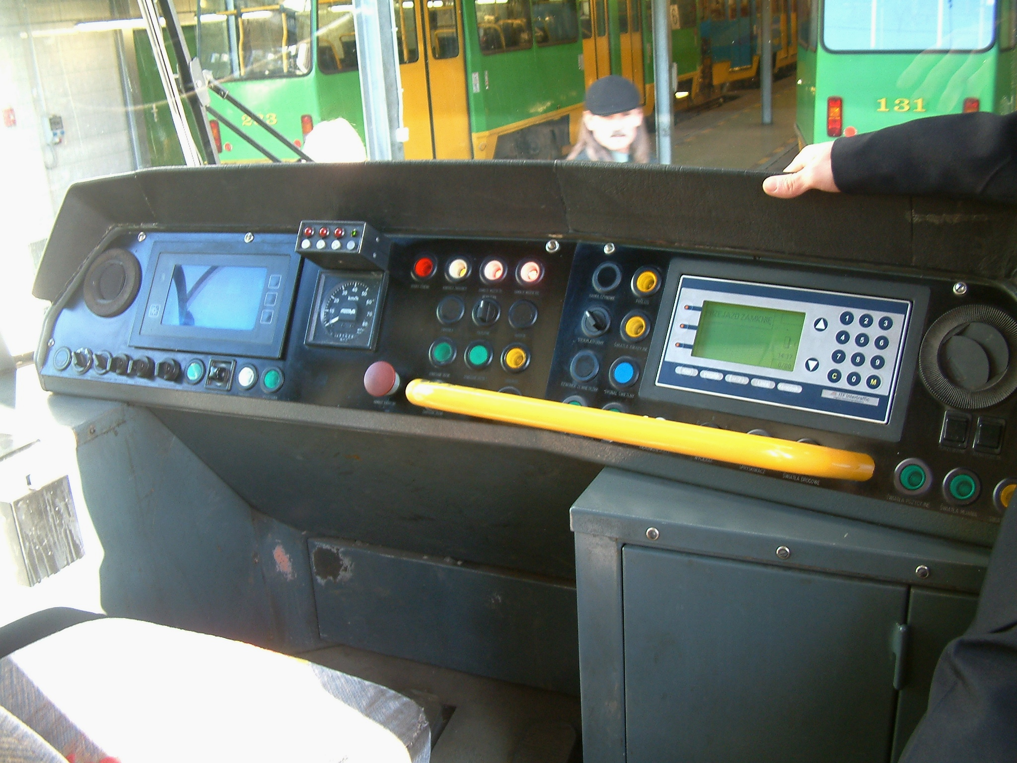 Tatra/HCP RT6N1 - control panel